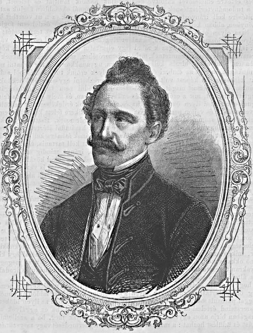 gróf Dessewffy Emil (1814–1866) politikus, közgazda, a Magyar Tudományos Akadémia elnöke (Vasárnapi Ujság, 1862. január 5.)